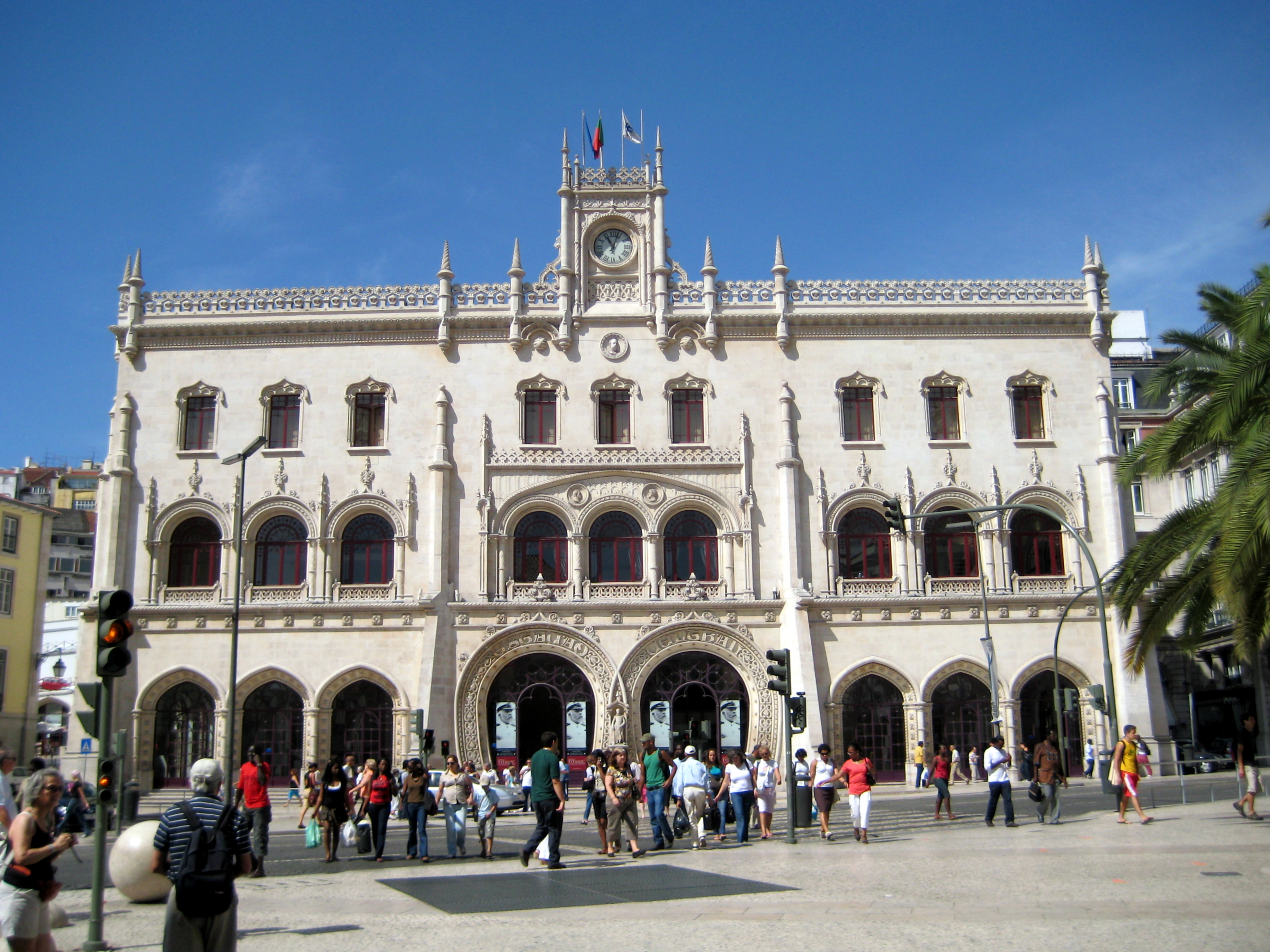 Rossio